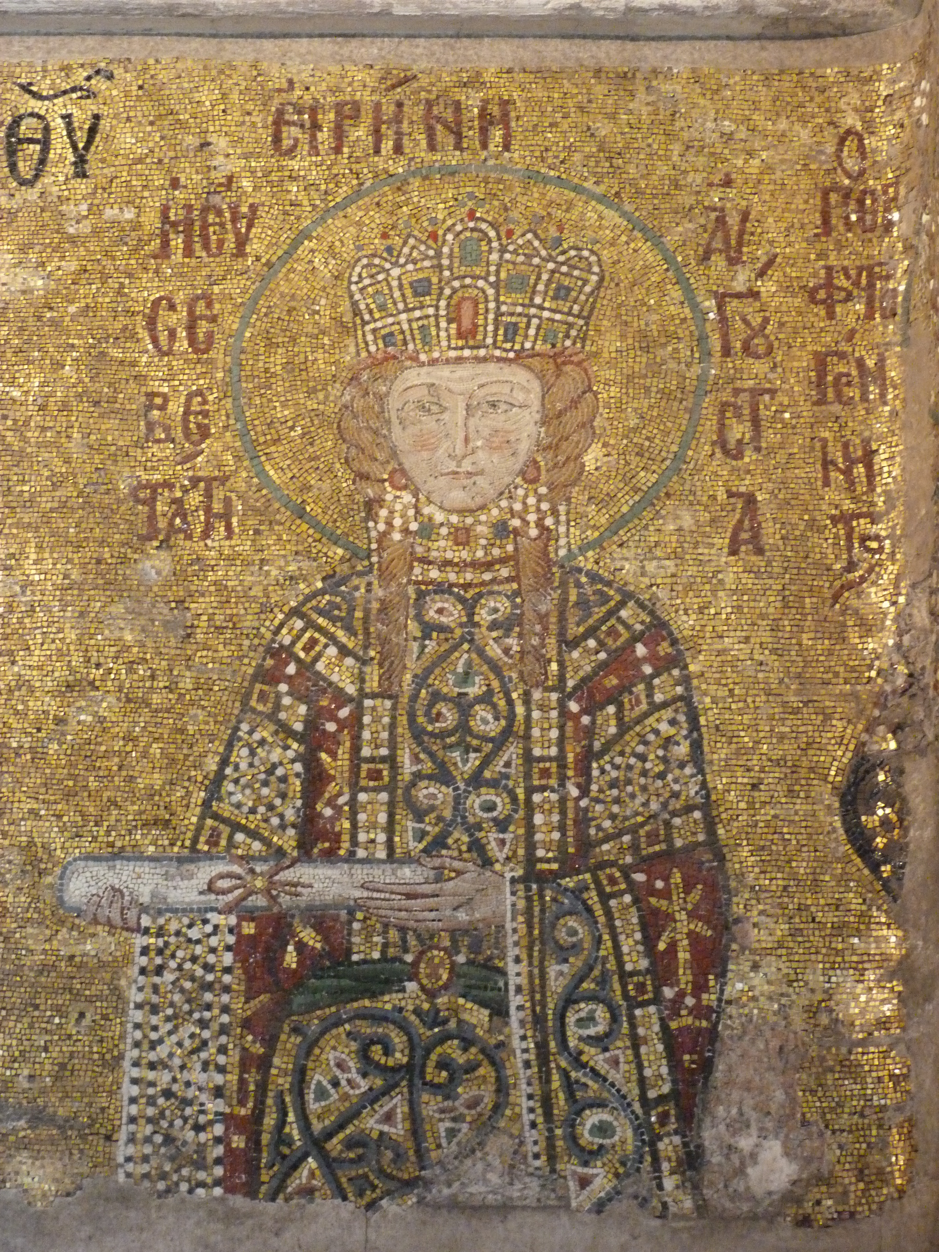 A felvétel 2014. október 23-án készült. Törökország, Isztambul. Hagia Szophia. Az isteni bölcsesség temploma. Az 563 december 24-én felszentelt keresztény templom mintegy ezer évig a Konstantinápolyi Patriarchátus székhelye, a Bizánci Birodalom szellemi központja. Az imafülke két oldalán hatalmas bronz gyertyatartók állnak, amelyeket Nagy Szulejmán (I.) (a „Törvényhozó”, Kánuni) 1526-ban Buda első török megszállásakor a budai várból Konstantinápolyba szállíttatott. Ezek a gyertyatartók több mint 450 éve ugyanazon a helyen állnak, ahova I. Szulejmán annak idején állíttatta őket. ©© Derzsi Elekes Andor, Budapest, 2014, A kép egészben, vagy részletekben másolását, bármilyen úton történő sokszorosítását és felhasználását a szerző ellenérték nélkül, jogutódjaira is kihatóan megengedi. Az engedély kiterjed a kereskedelmi célú hasznosításra is. Kéri azonban nevének feltüntetését a felhasználás során. A Metapolisz sorozat valamennyi képe és filmje Creative Commons alatti valamint kereskedelmi - for profit - célra is felhasználható. Ajánlott hivatkozás: Derzsi Elekes Andor: Metapolisz DVD line